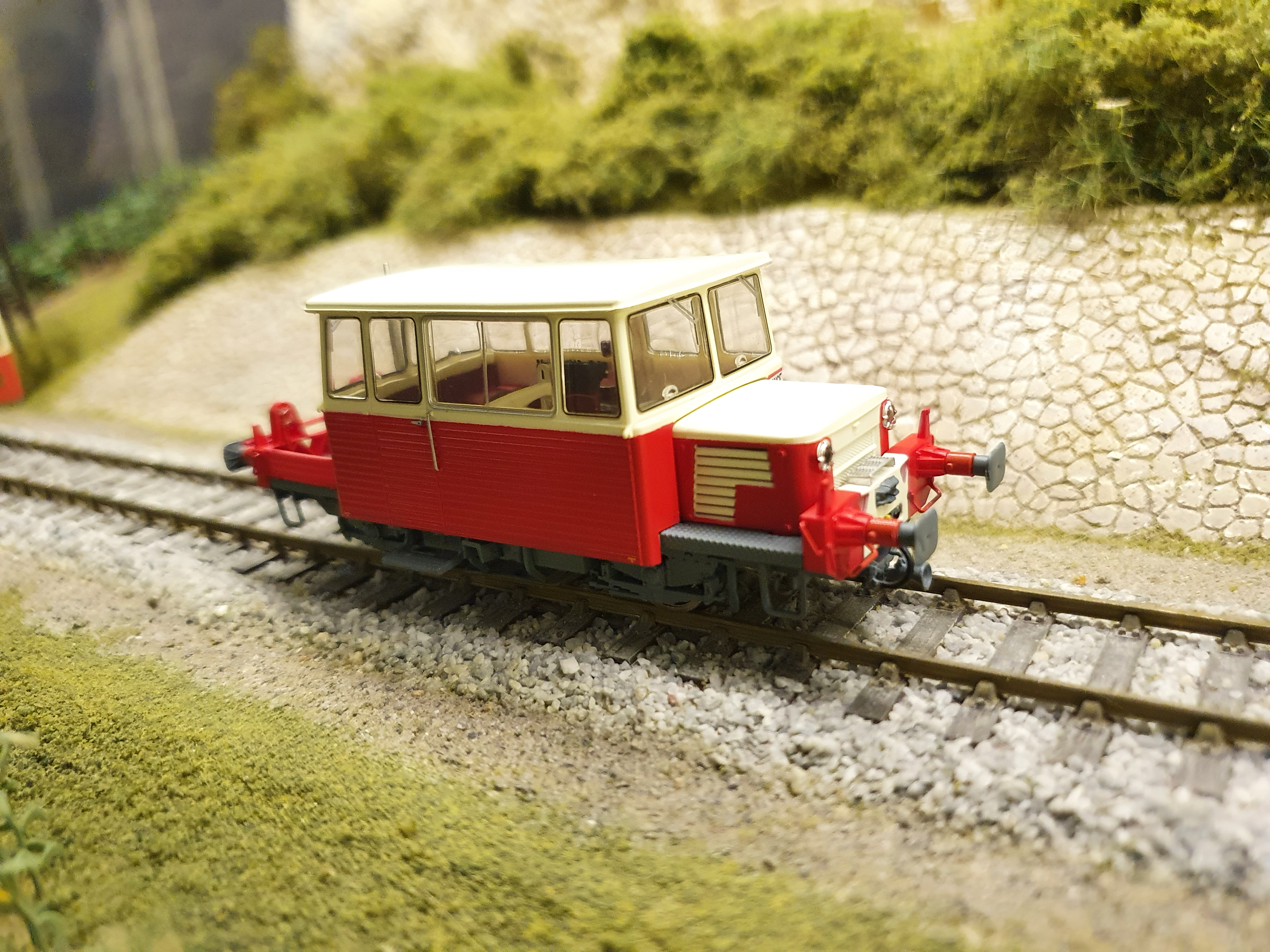 DU65 REE